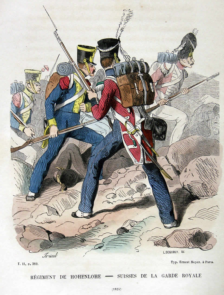 Französisches „Regiment Hohenlohe“ 1826